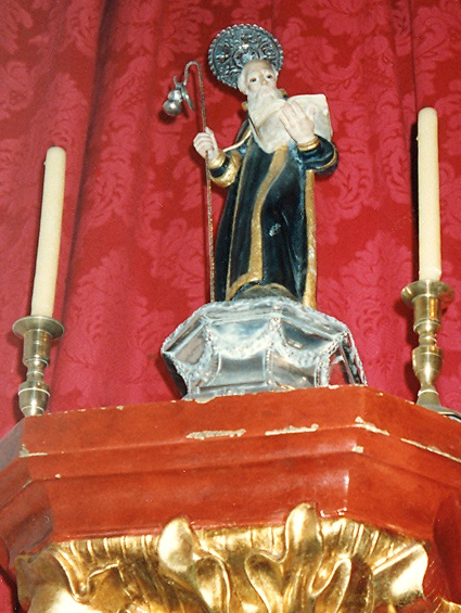 Saint Amaro (San Amaro). Statue at the Ermita de San Amaro, Puerto de la Cruz, Tenerife.